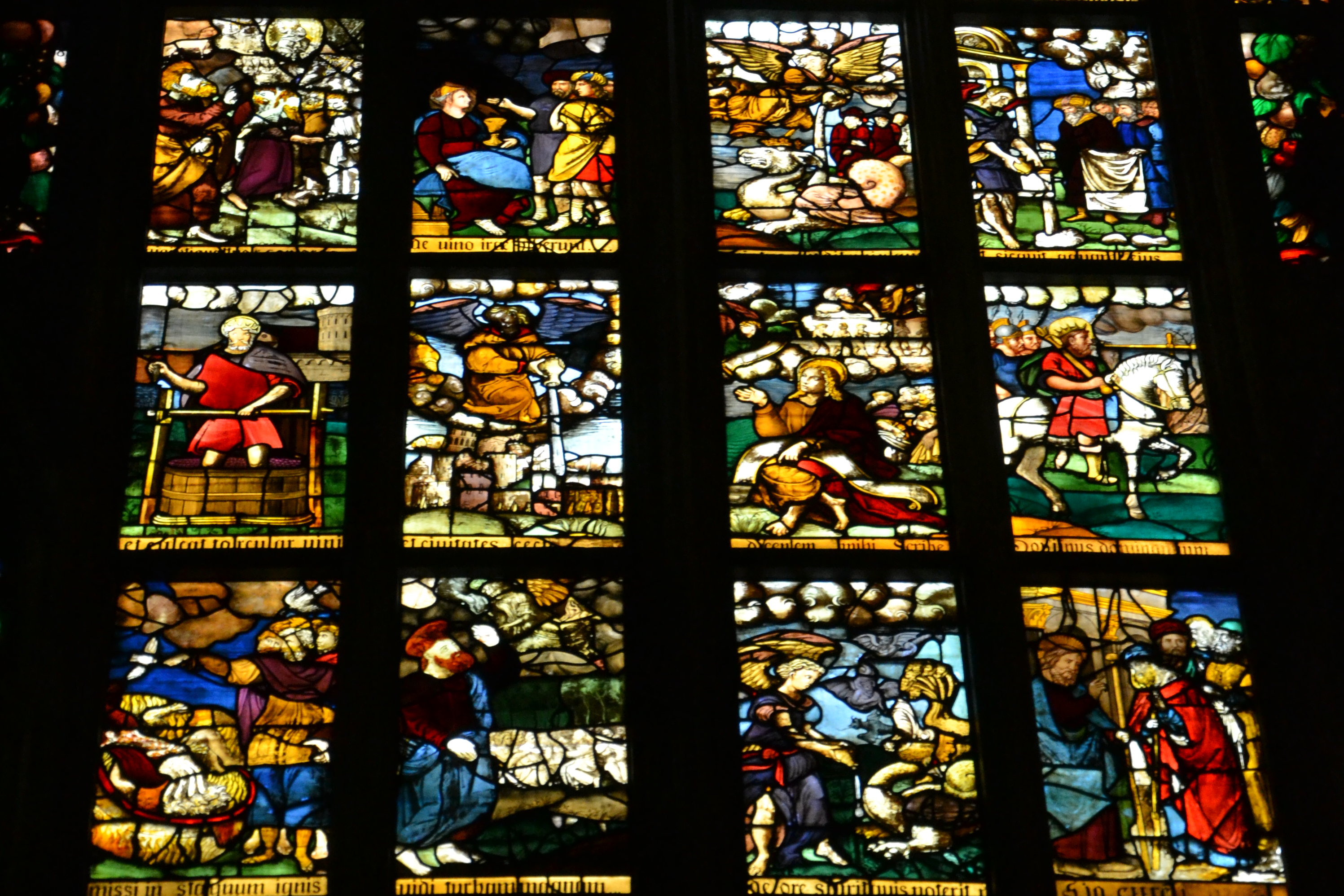 La vetrata centrale, dedicata alla Visione dell'Apocalisse mantiene invece nella parte alta una cinquantina di pezzi del XV e XVI secolo